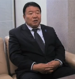 VOAのｲﾝﾀﾋﾞｭｰを受ける水島聡。